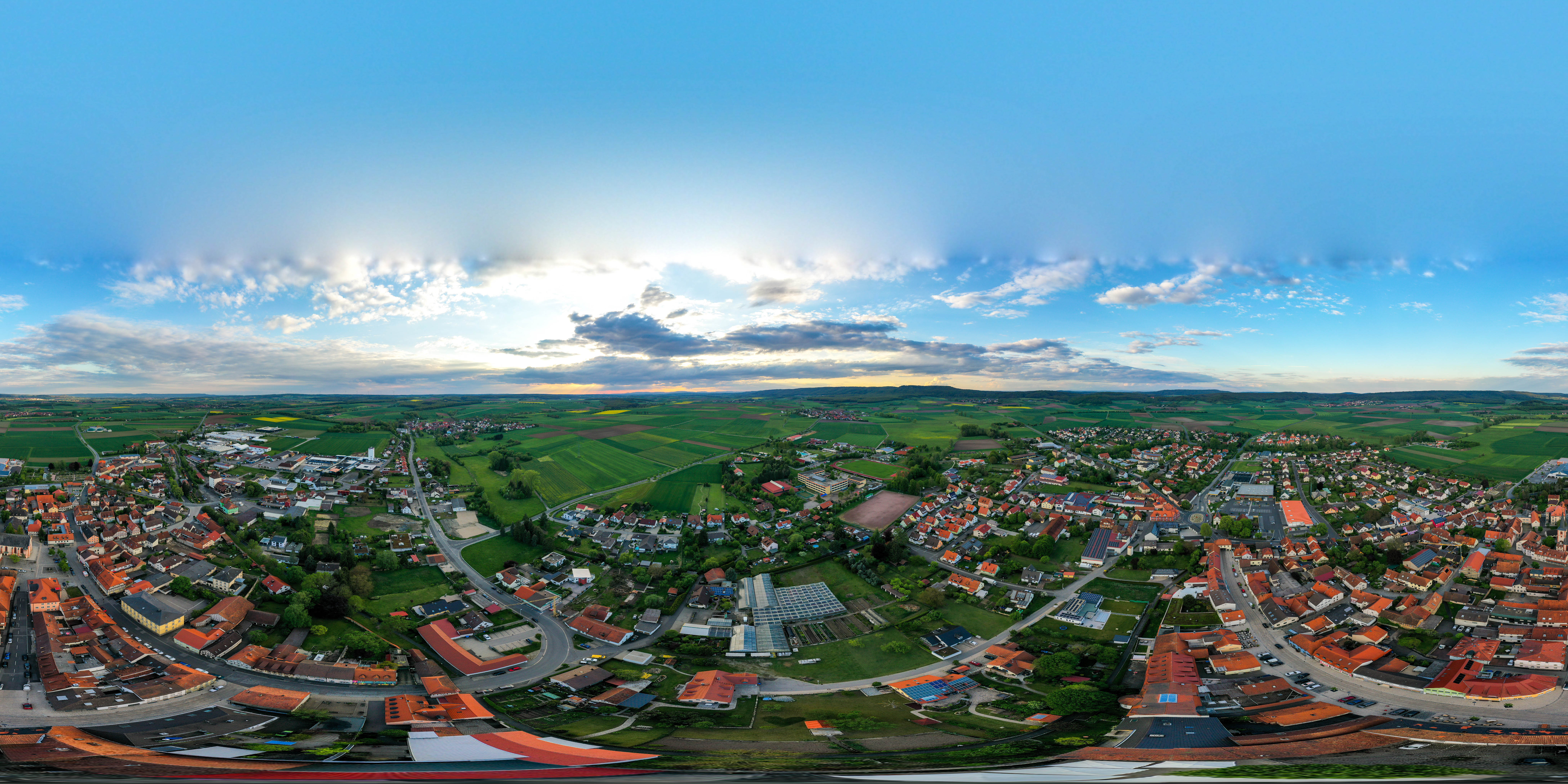 Hofheim in Unterfranken – Panorama von oben. Die Starterlaubnis bekam ich von der Chefin des Restaurants Fränkischer Hof. Der Biergarten war nämlich nicht geöffnet, so störte niemanden der Aufstieg der Drohne auf 100 m. Zur Orientierung eignet sich der (einzige) Kreisverkehr der kleinen Stadt. Er schließt im Norden an eines der drei Stadttore an. Unmittelbar nördlich davon ist das Krankenhaus zu sehen. Die Gemeinde, entfernt in Richtung Norden am Berg, ist Eichelsdorf. Gehen wir gegen den Uhrzeiger die benachbarten Orte ab: im Nordwesten Reckertshausen, dahinter Friesenhausen. Im Westen Lendershausen, weiter entfernt Kerbfeld. Im Süden Ostheim, im Osten Gossmannsdorf.